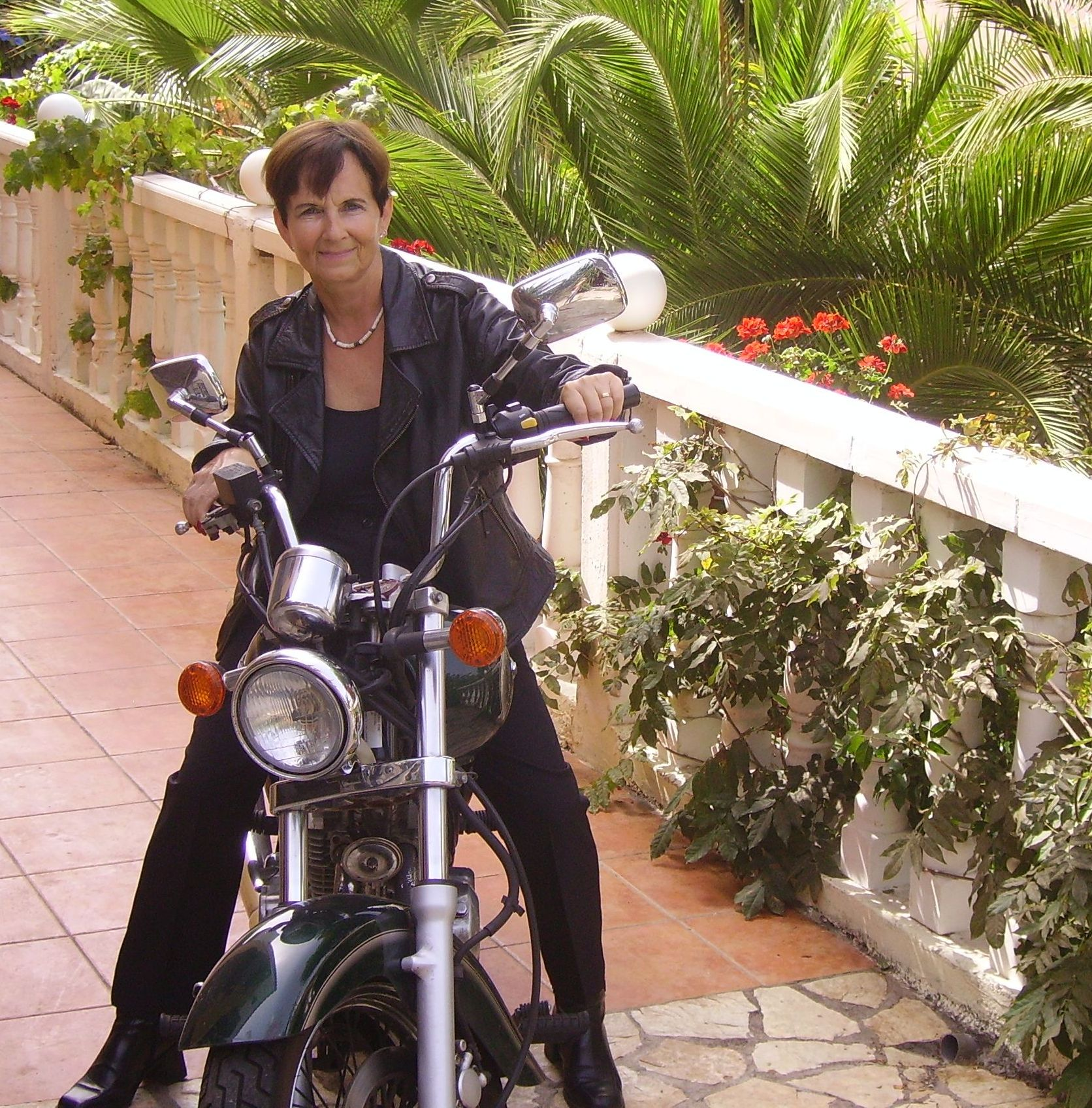 PENTAX Image